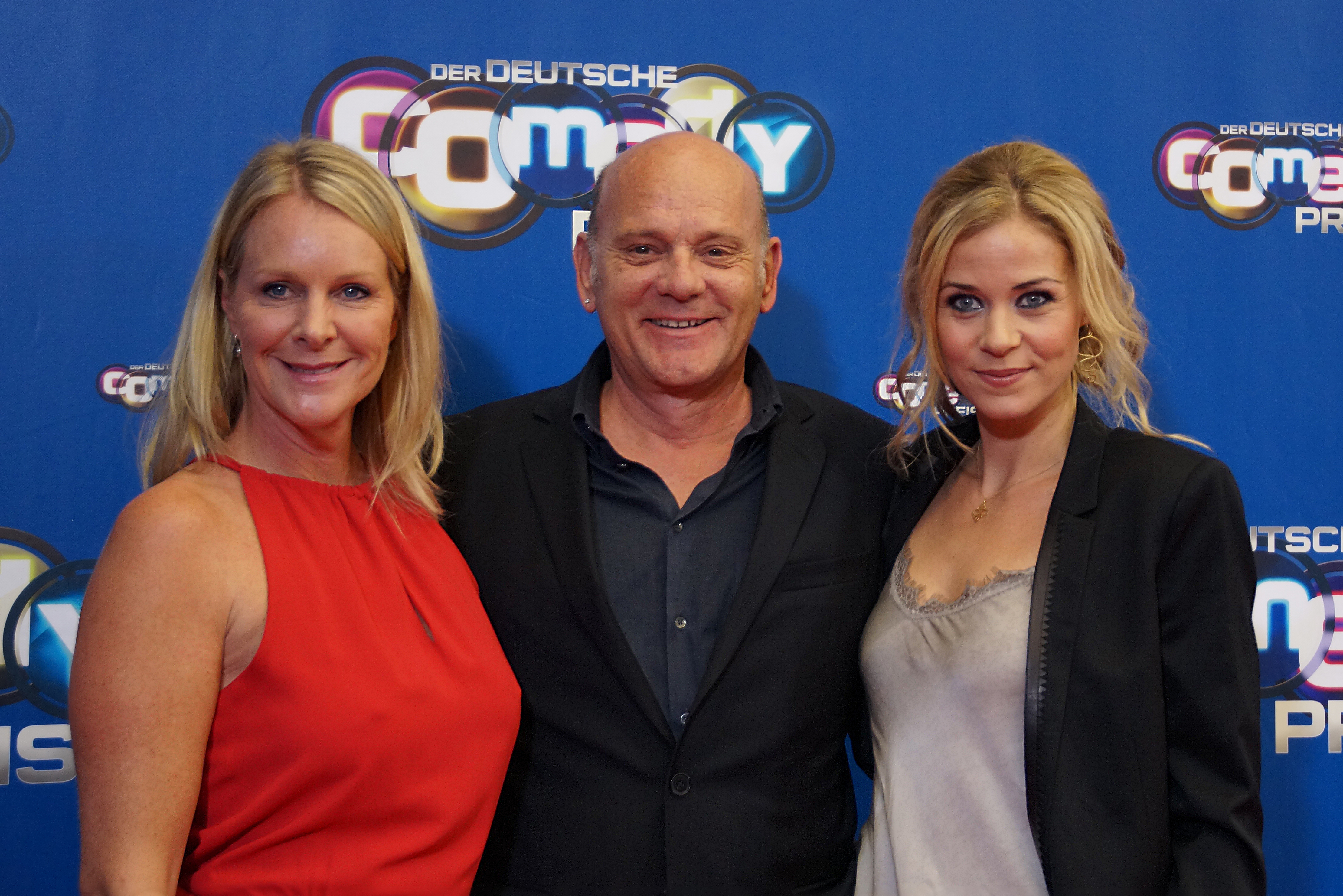 Anne Moll, Ulrich Gebauer, Jessica Ginkel beim Comedypreis 2016, im Oktober 2016, Köln.